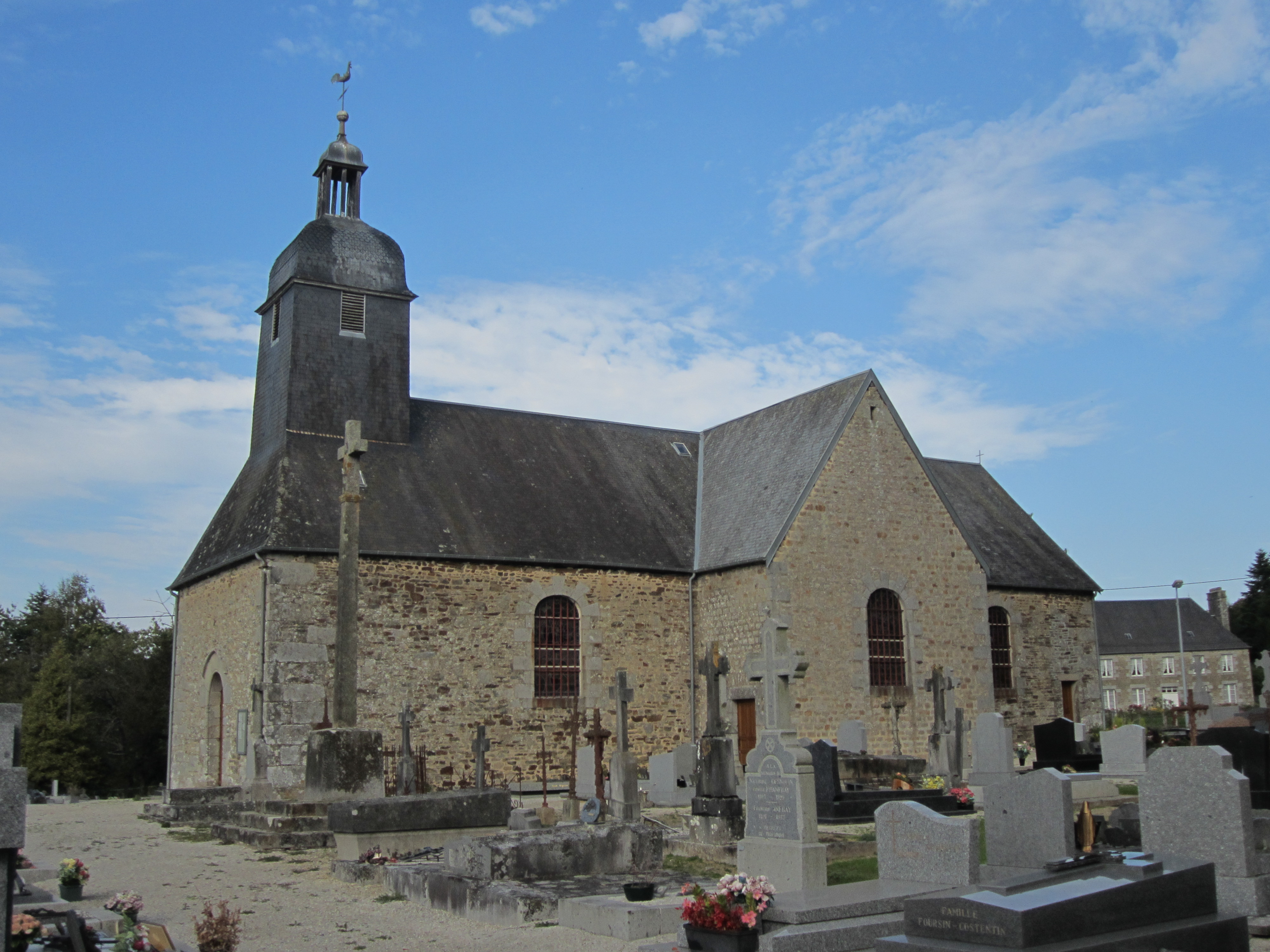 Isigny-le-Buat, Manche